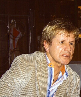 G.G. Anderson 2005 in Ibbenbüren von Peter Link